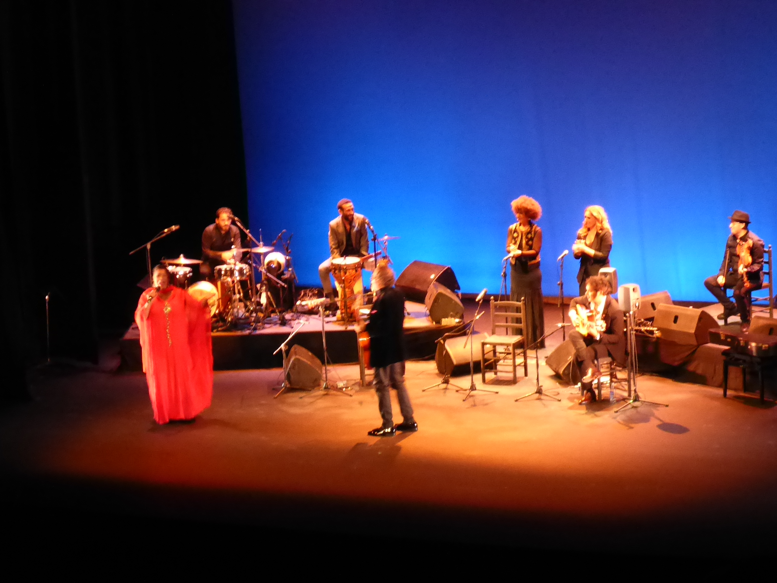 Diego Carrasco, concierto gira "No marrecojo", en el teatro Villamarta de Jerez de la Frontera (España), con Remedios Amaya